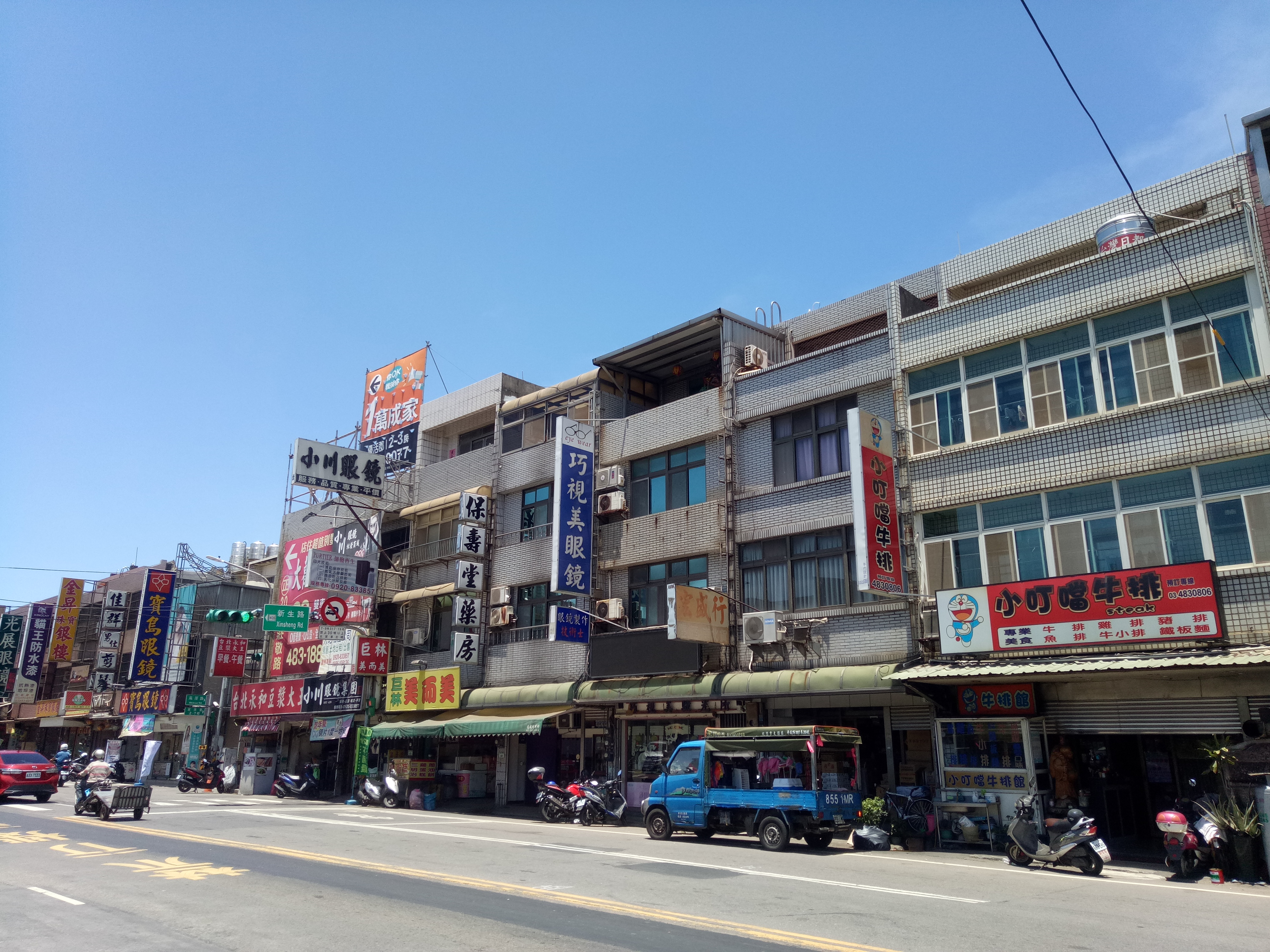 桃園市觀音區草漯市區，大觀路街景。